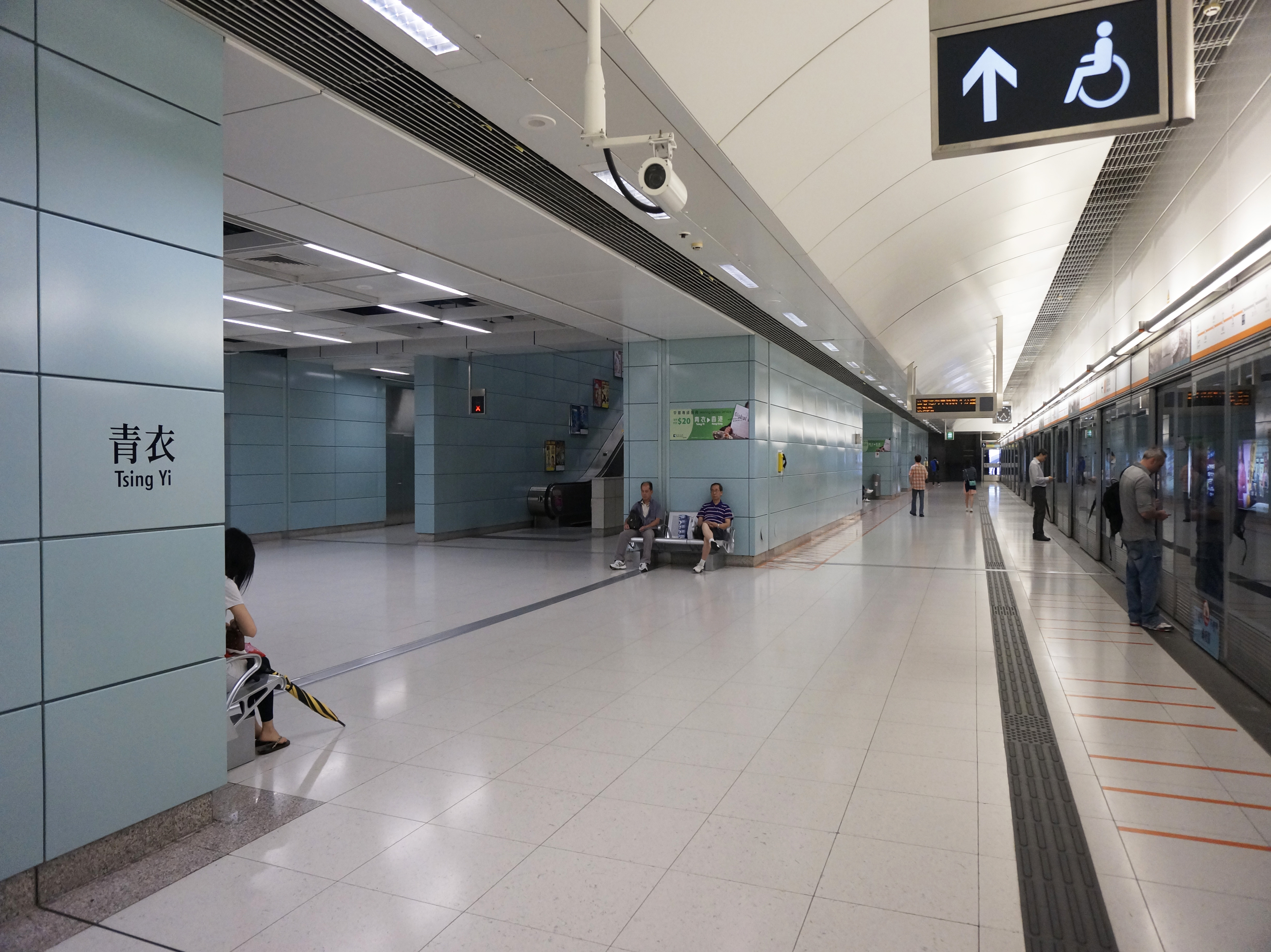 港鐵青衣站東涌線月台